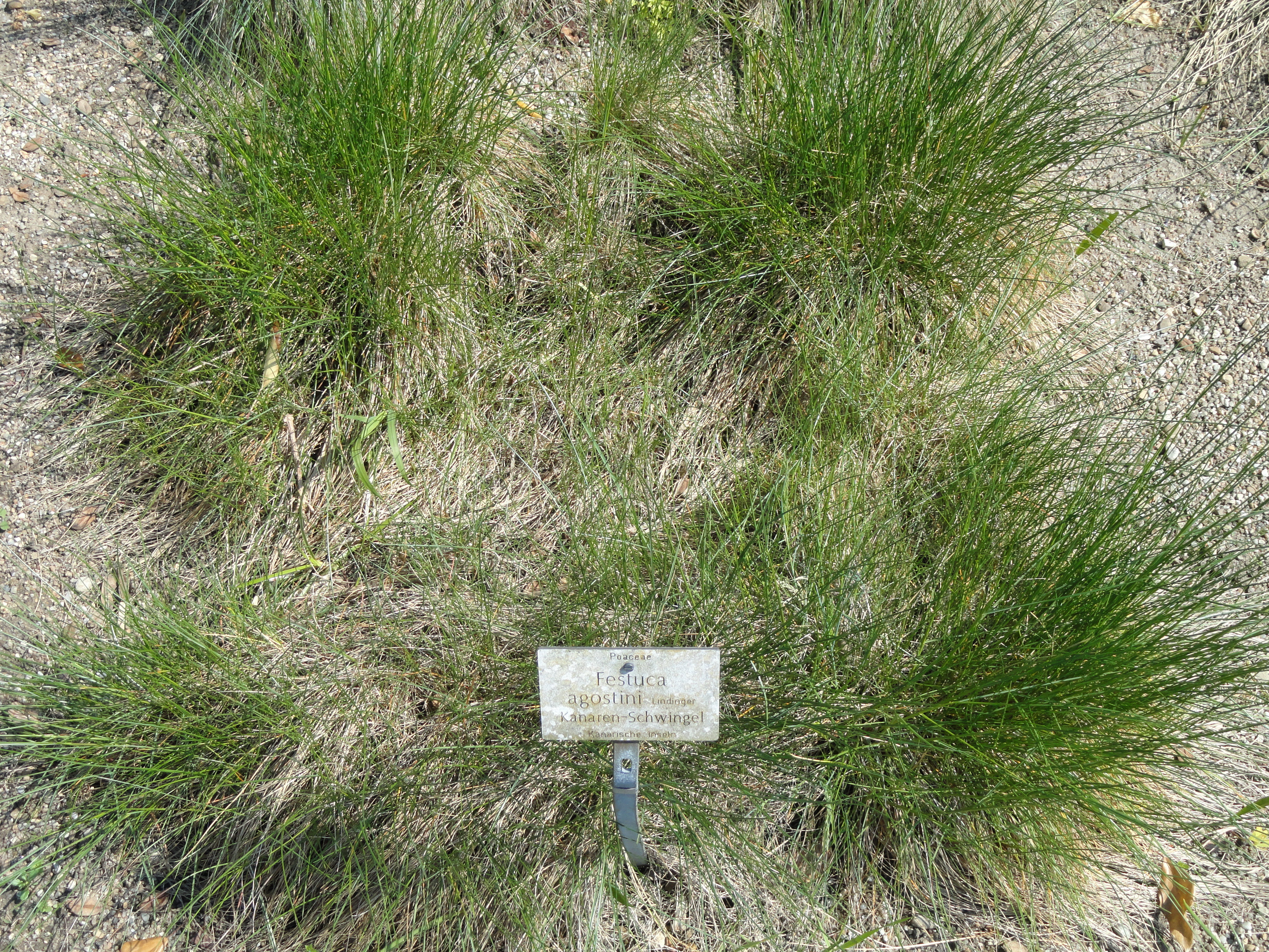 Festuca agostini specimen in the Botanischer Garten München-Nymphenburg, Munich, Germany.